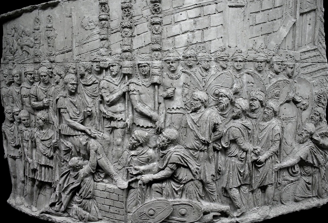 Moulage de la frise de la colonne Trajane, exposé au Museo della Civiltà Romana, Rome. Soumission de Décébale, 102